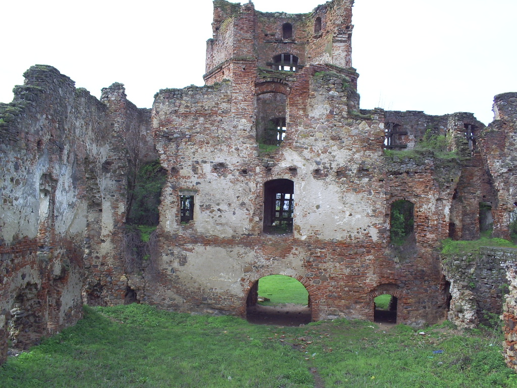 Cetatea Medieșu Aurit